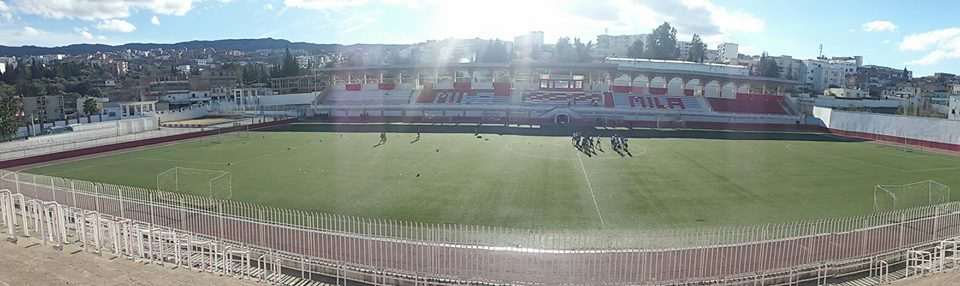 ملعب بالقاسم بالعيد (ميلة) هو ملعب الرئيسي لشباب ميلة